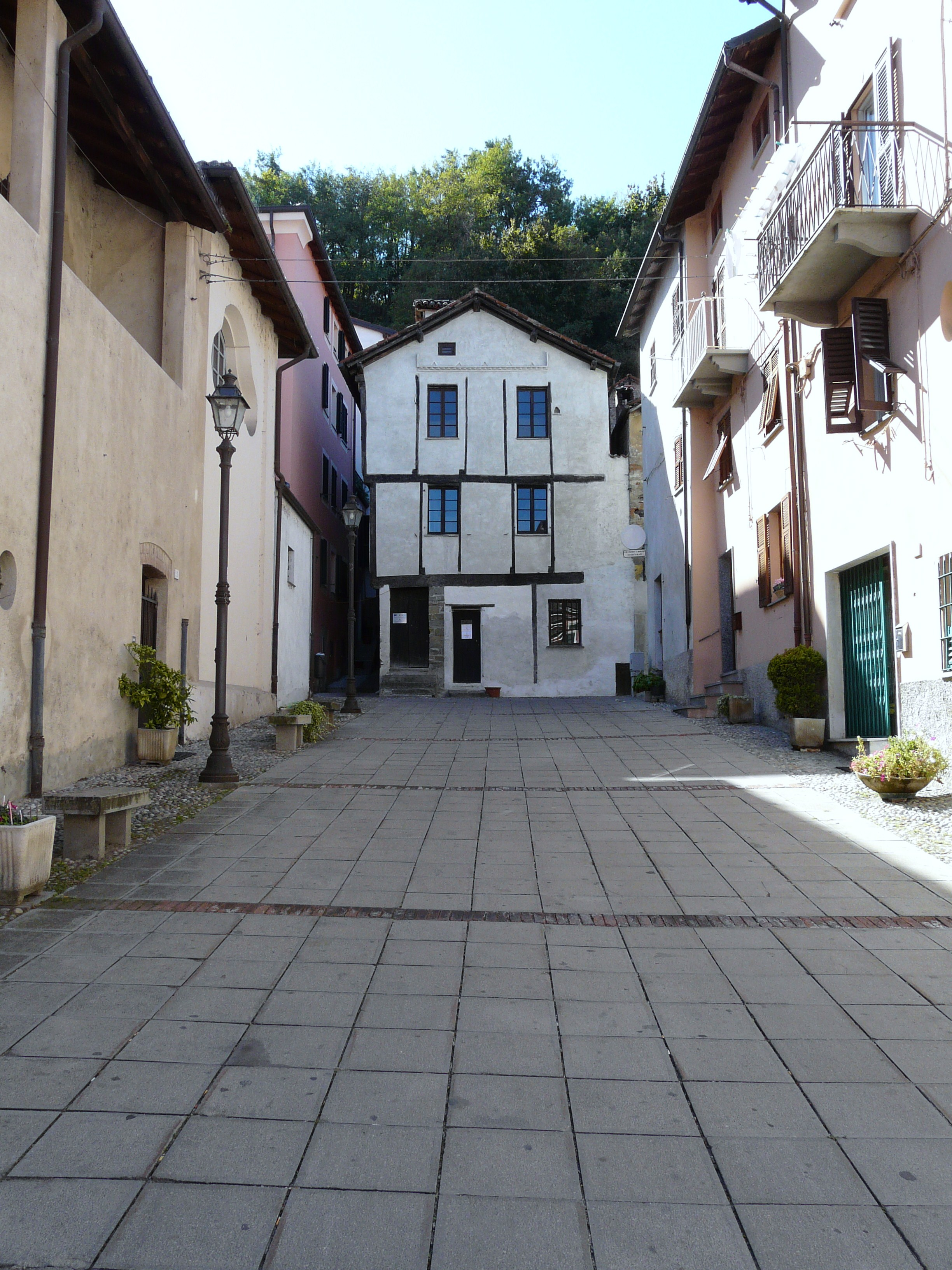 Casa gotica, Arquata Scrivia, Piemonte, Italy